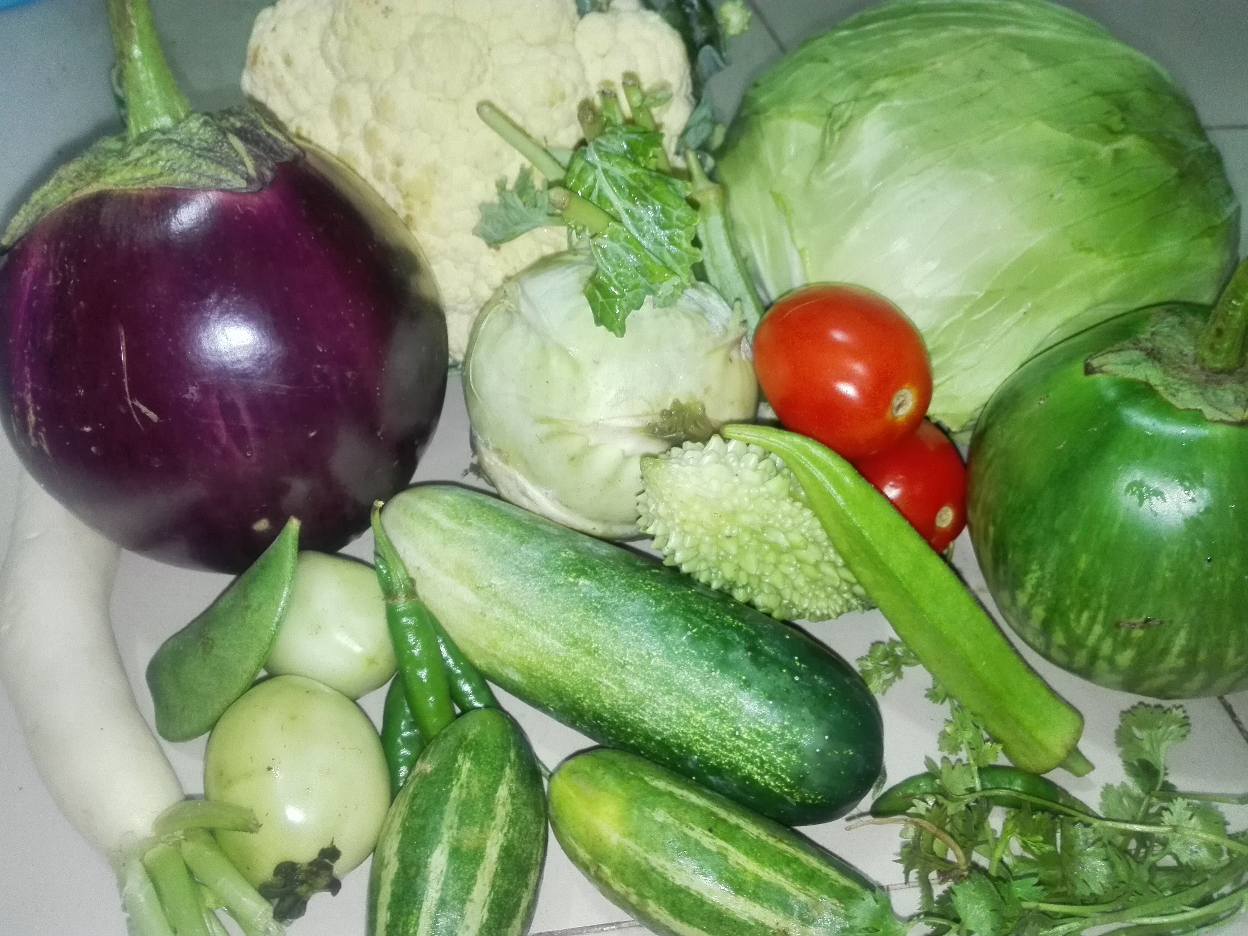 vegetables from Bangladesh